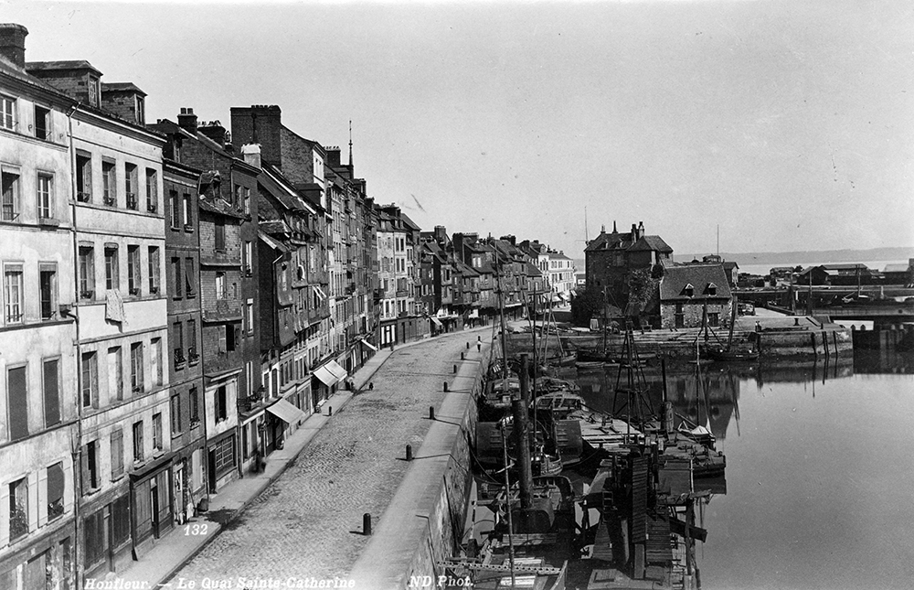 Quai Sainte Catherine à Honfleur - XIXème siècle